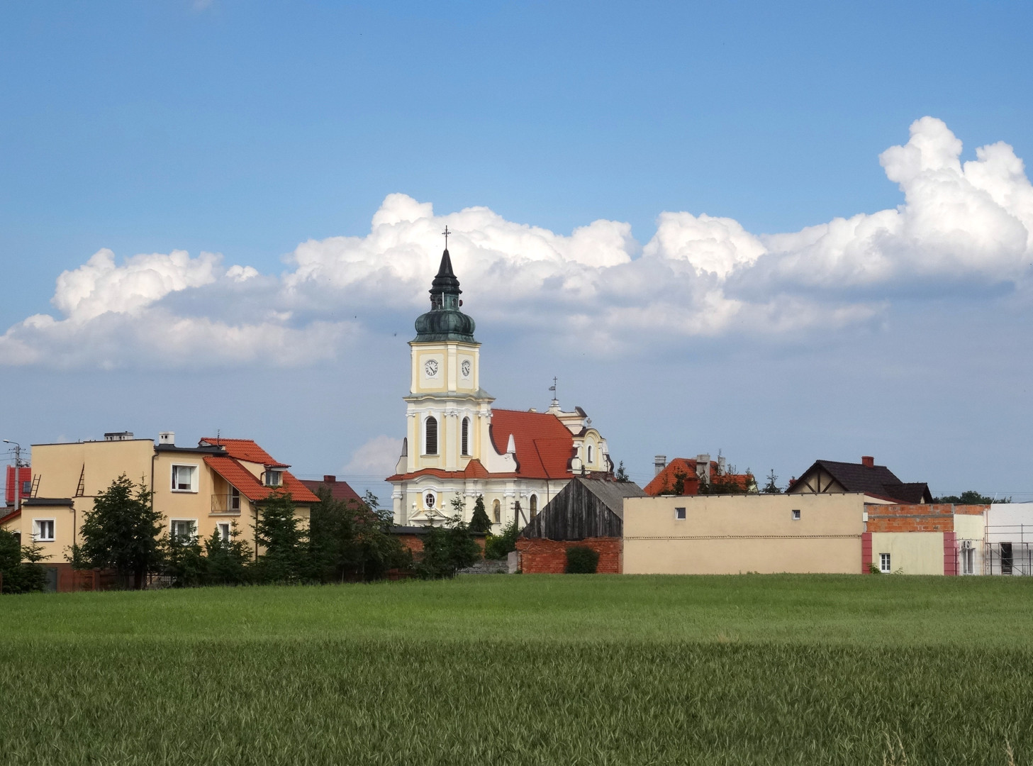 Wierzchucin Królewski, Kościół św. Piotra i Pawła